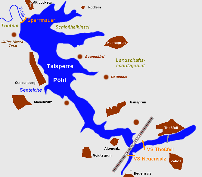 Talsperre Pöhl mit Ortschaften und Landmarken der Umgebung